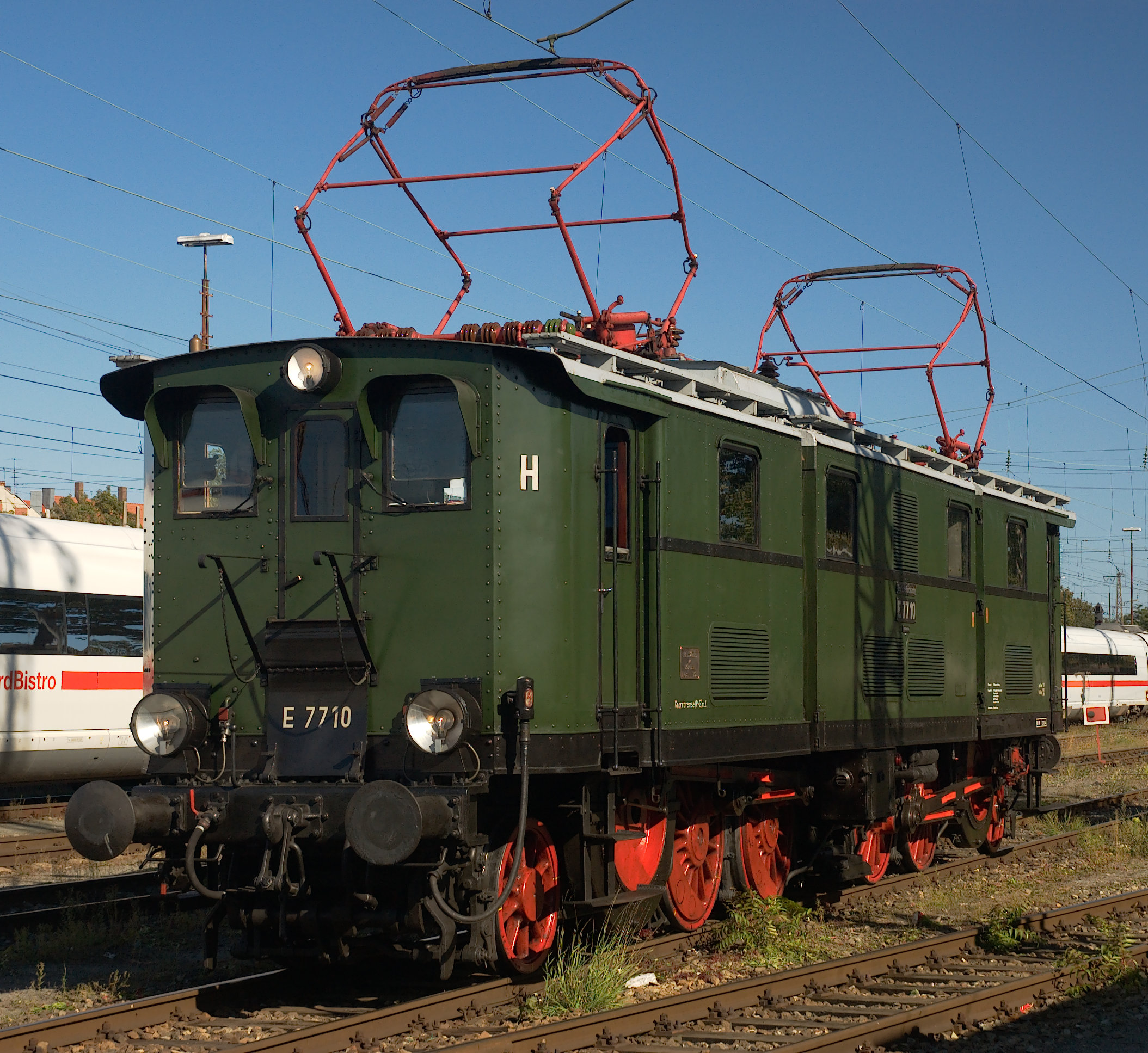 E7710 auf dem Fürther Lok-Festival 2007